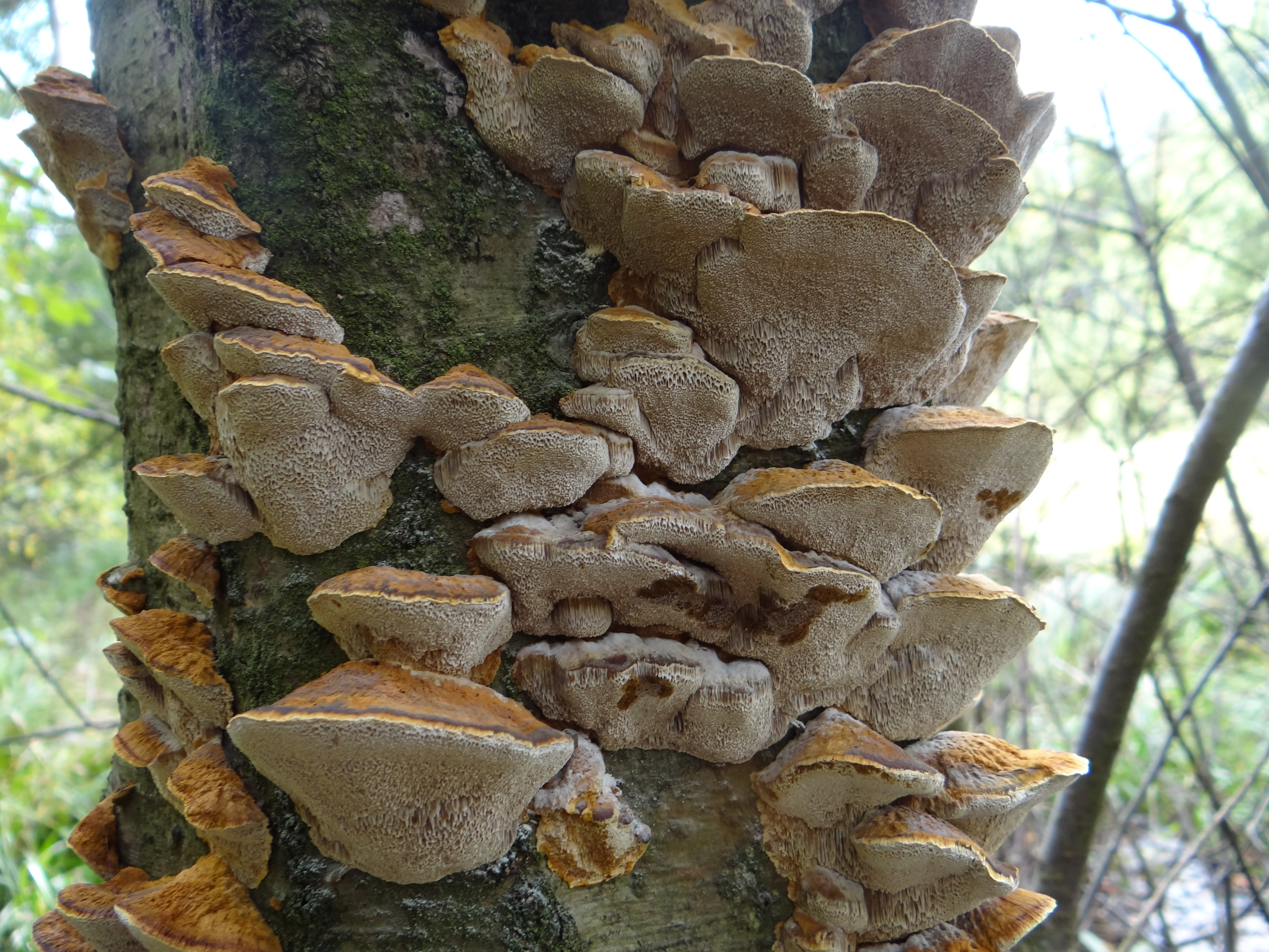 Xanthoporia radiata (location: Poland, Leszczyna, województwo małopolskie)